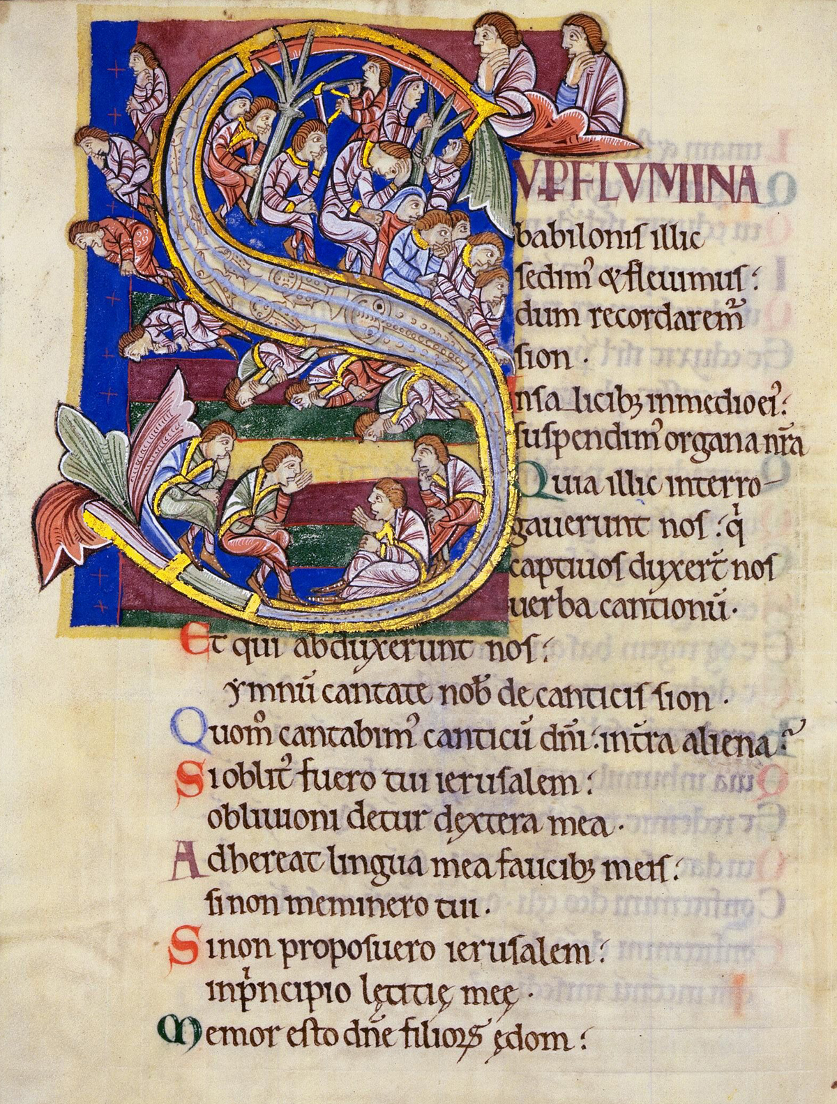 Psalm 136 (137), Initial S. In: Albani-Psalter